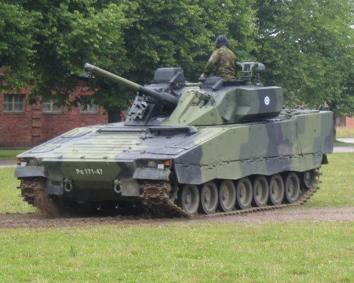 CV9030 esittelyssä Lappeenrannan Rakuunapäivillä